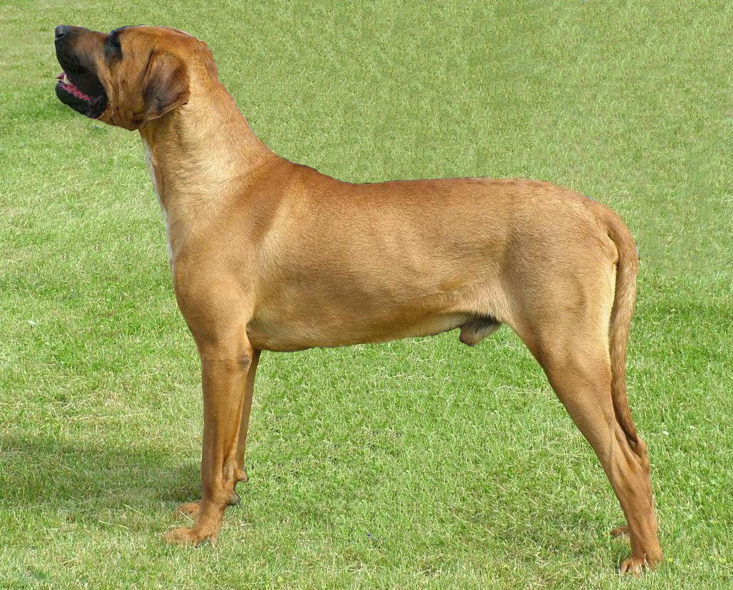 TOSA INU